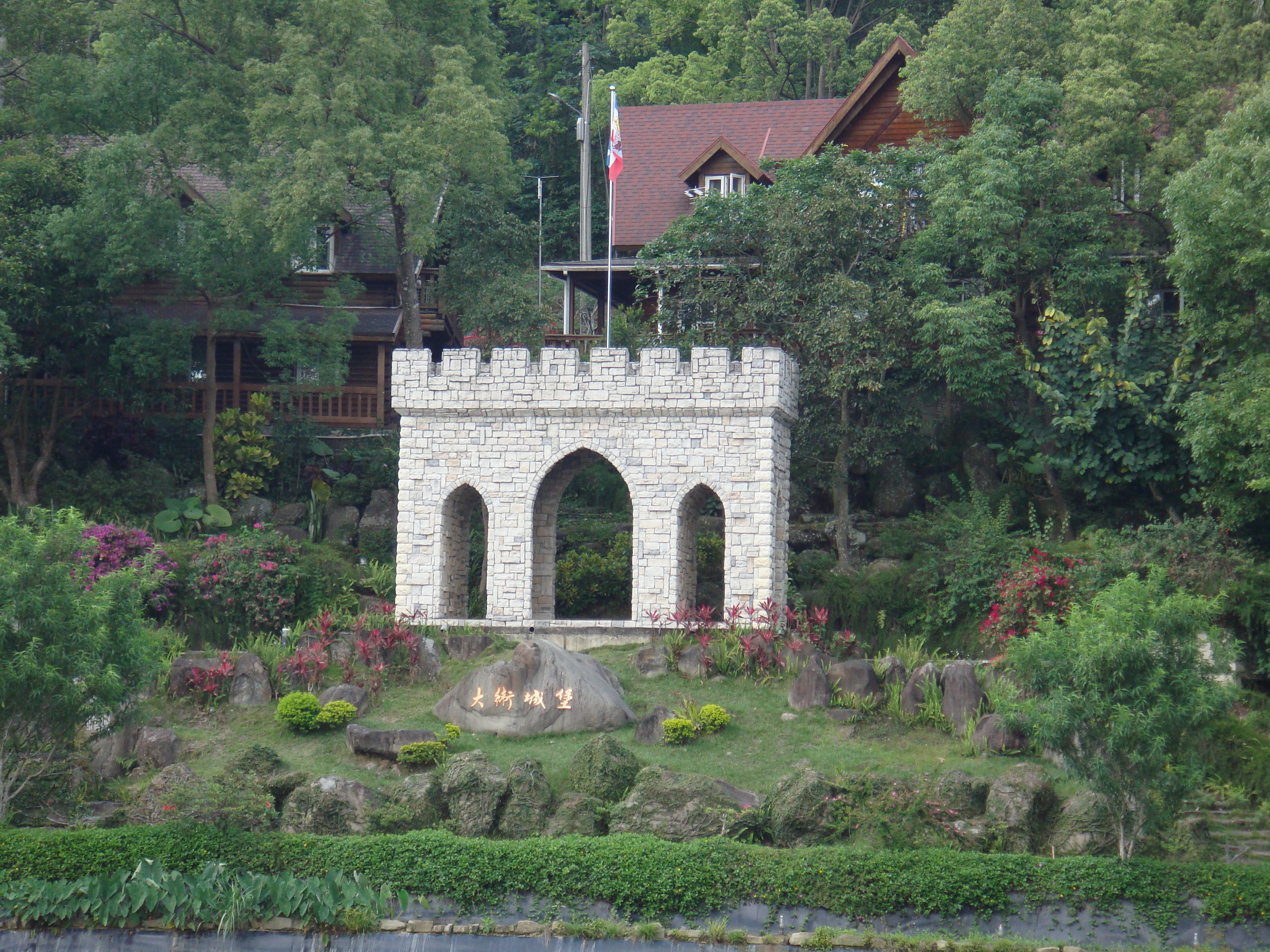 錫安山建築：大衛城堡